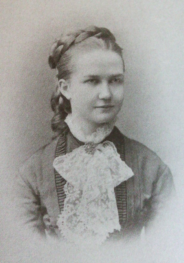 Софья Александровна Щербатова (1856—1928), супруга Василия Михайловича Петрово-Соловово (1850—1908).